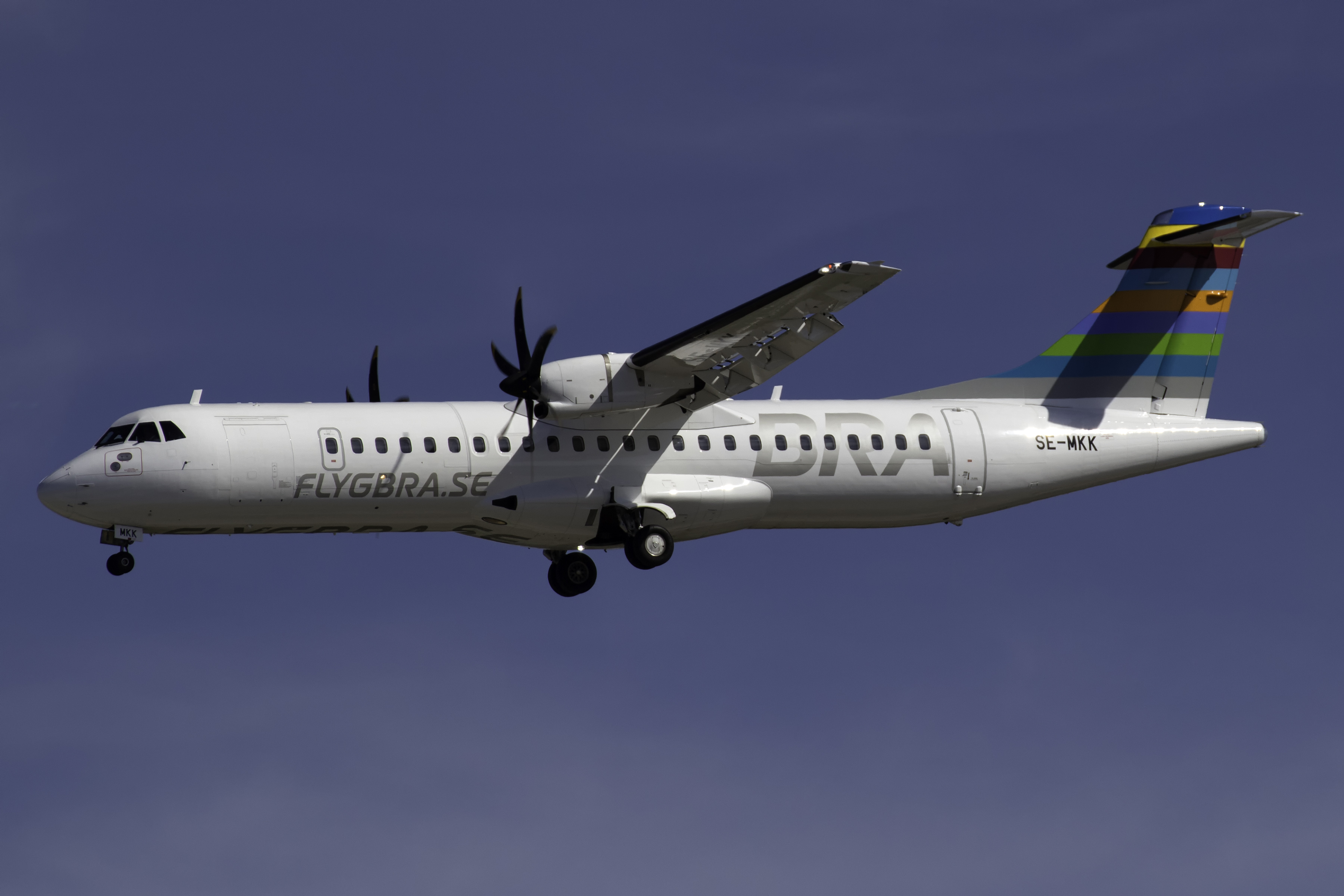 ATR 72 de BRA aterrando no aeroporto de Visby.